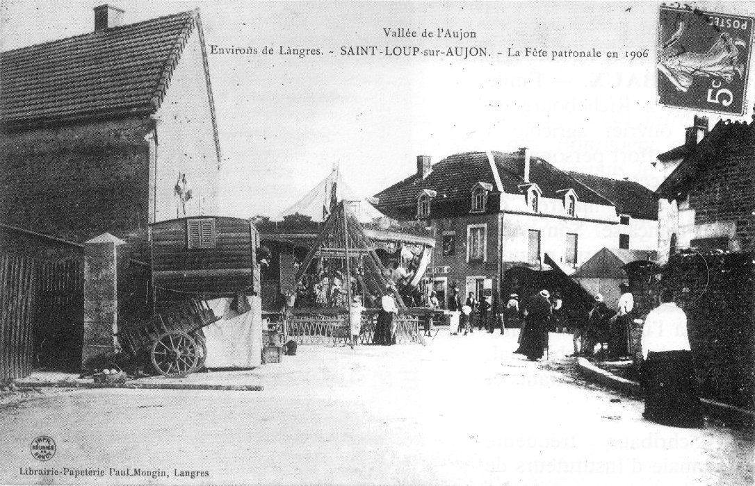 Carte postale ancienne La fête patronale de Saint-Loup-sur-Aujon, Haute-Marne, France